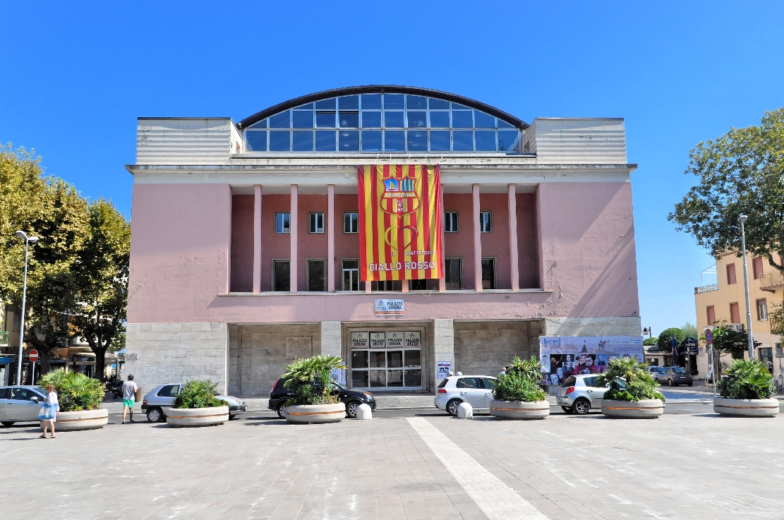 Francavilla al Mare 2014